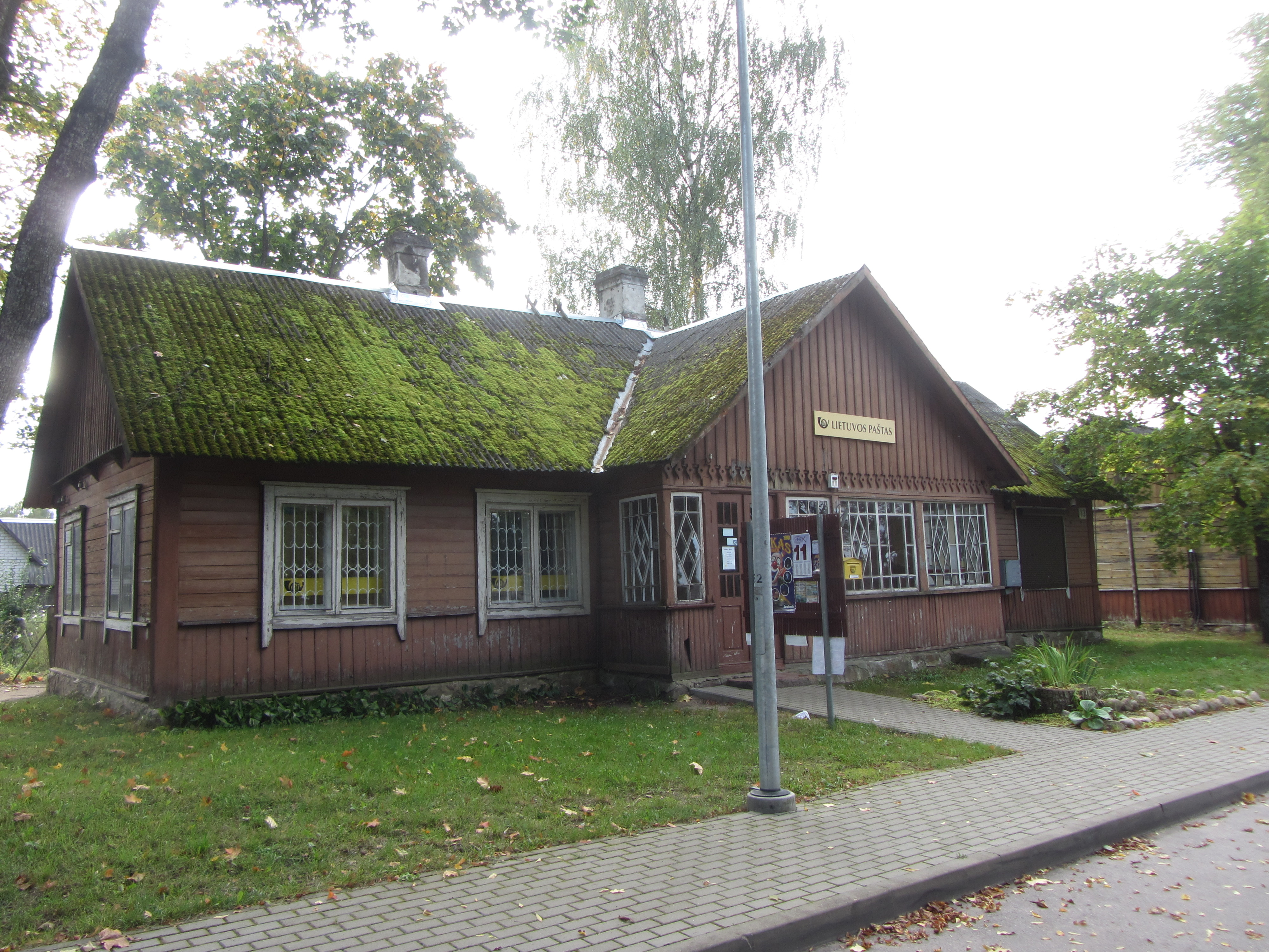 Rūdiškės, Lithuania